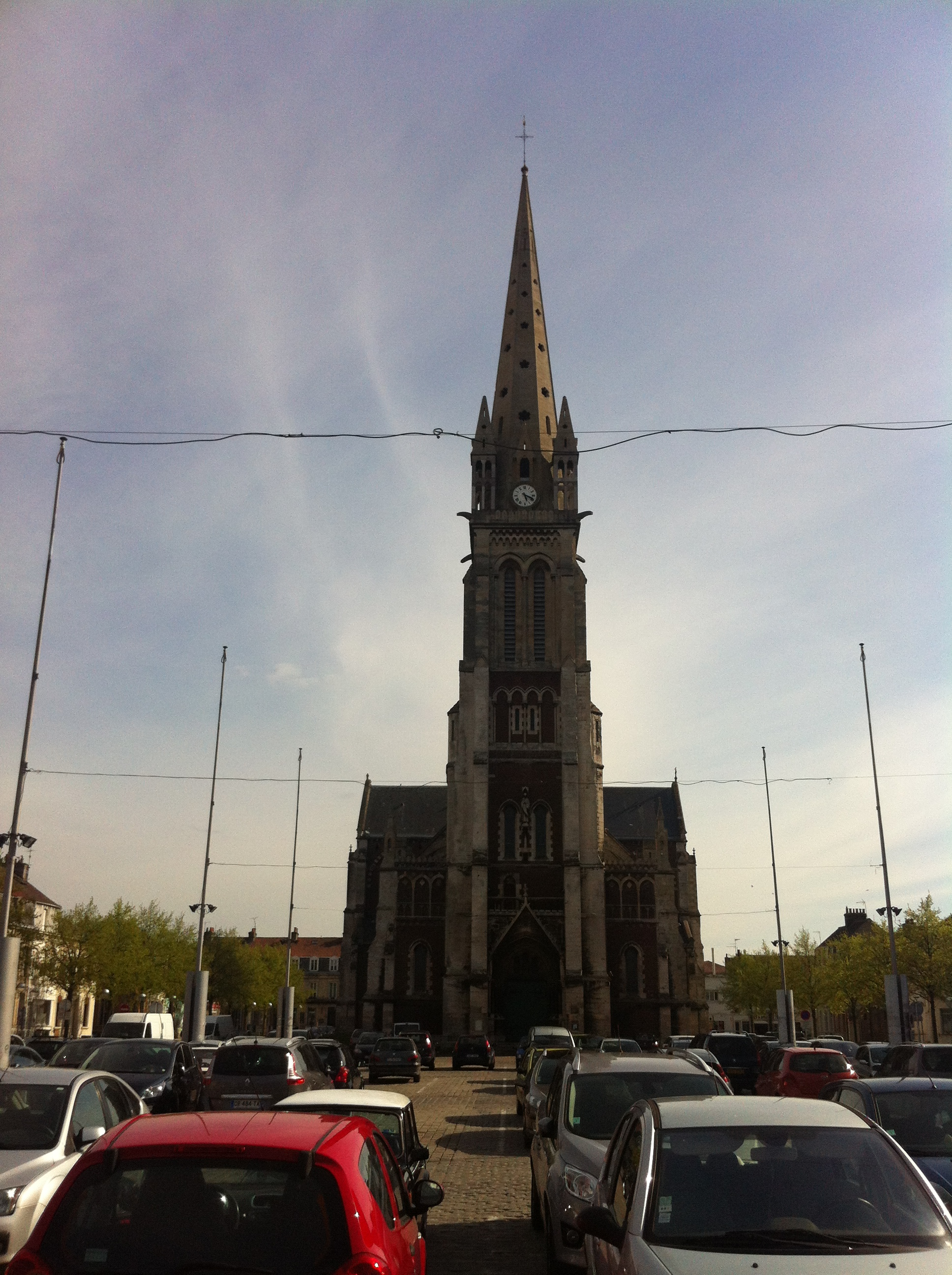 L'Église Saint-Pierre de Calais, prit depuis la Place Crève-coeur.